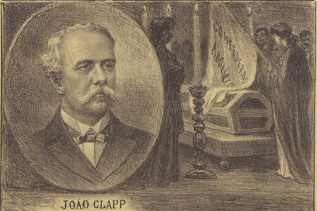 João Clapp, presidente da Confederação Abolicionista. Falecido em 11 de dezembro de 1902, em Petrópolis.